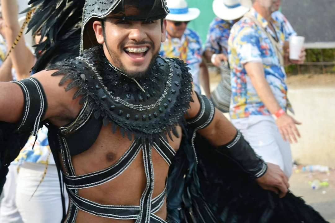 Disfraz de Roberto Bolívar Márquez. Diseño del disfraz: José Antonio